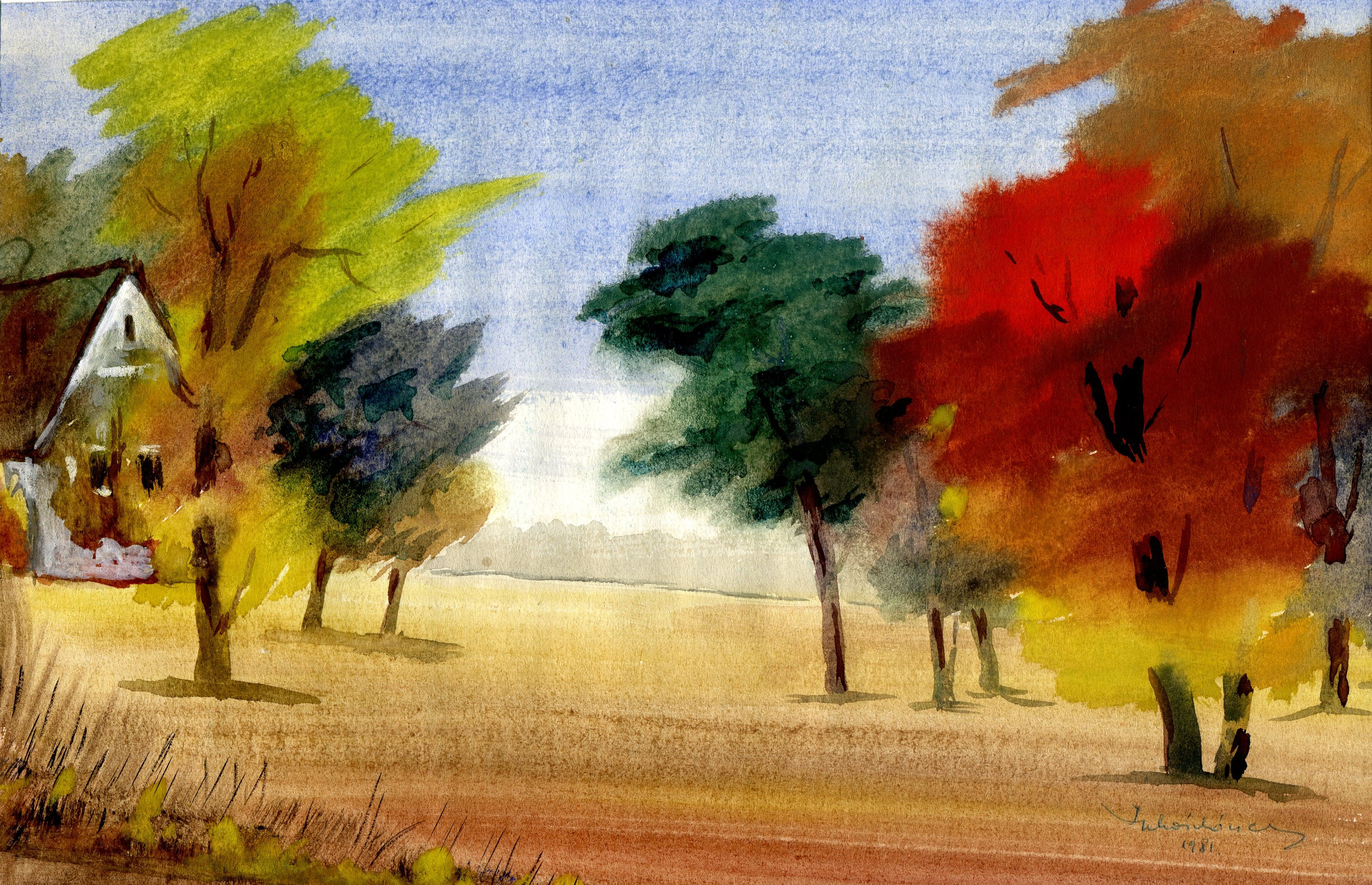 Juhász József akvarell festménye, 1981